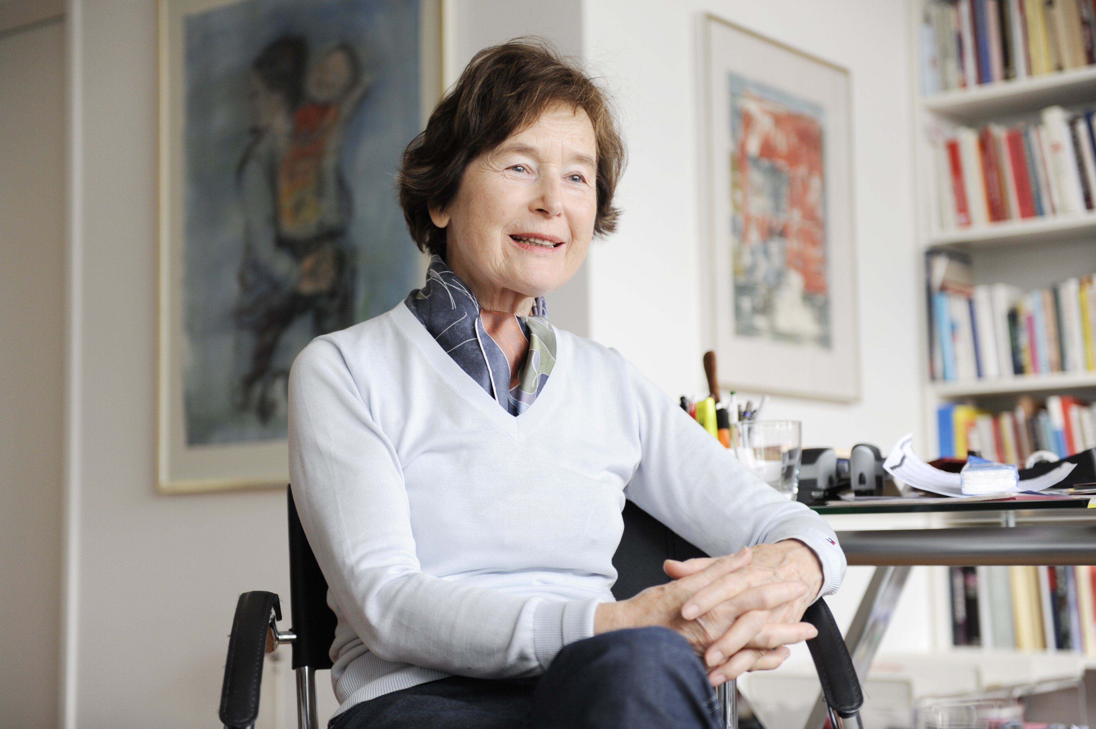 Elisabeth Kopp, ehemalige Schweizer Bundesrätin, in ihrem Büro in Zumikon